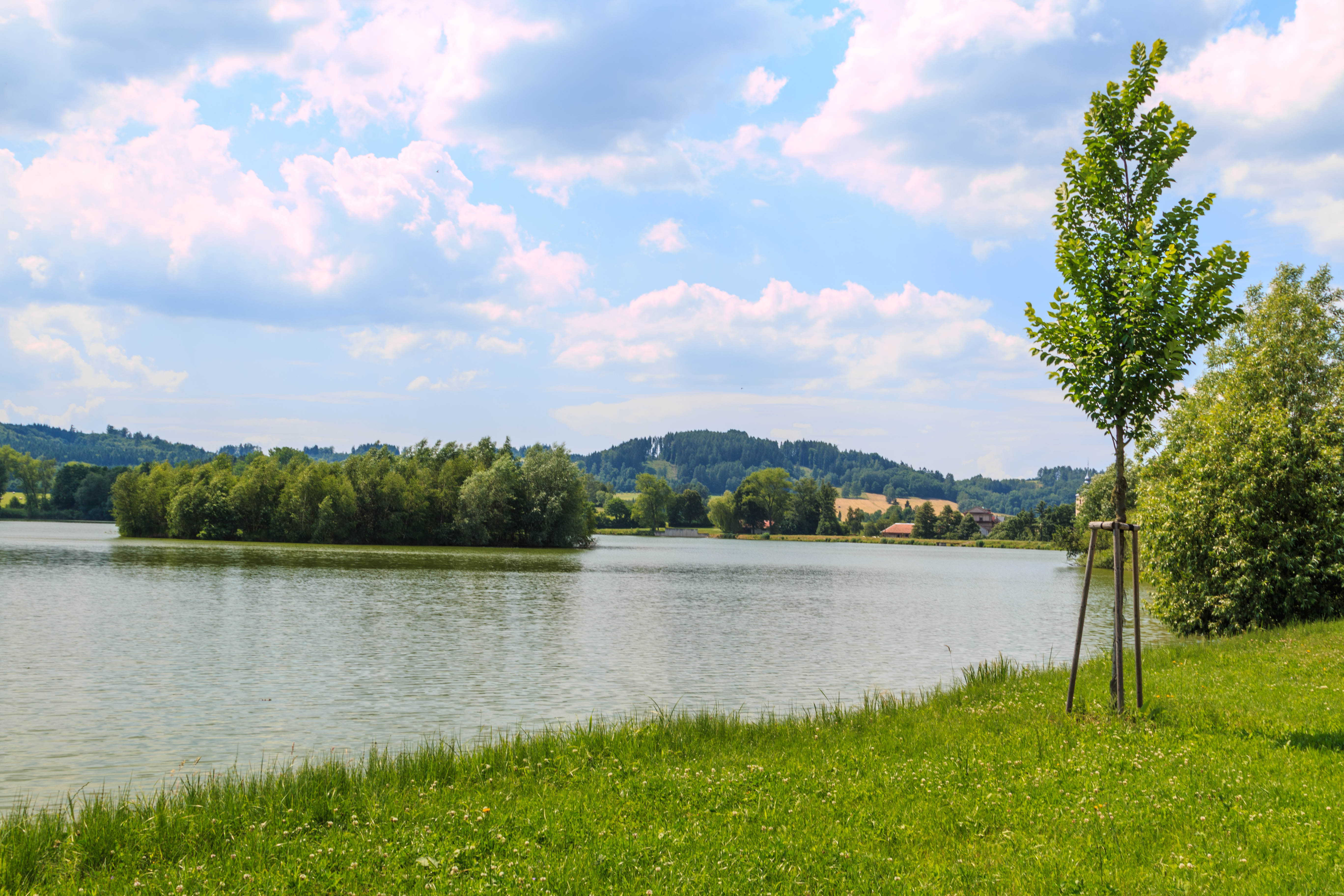 Čermenský rybník